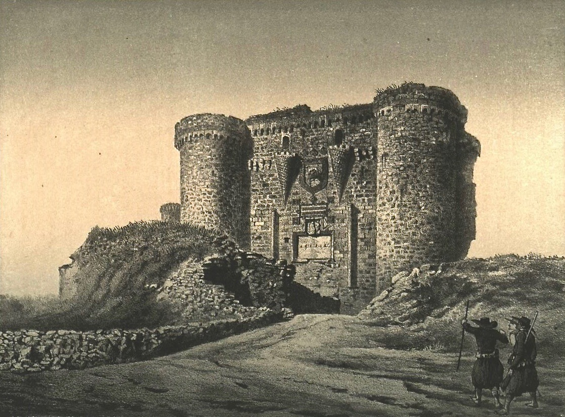 Francisco Javier Parcerisa (1803–1875): Das 1872 abgebrochene Schloss der Markgrafen von Astorga (León), 1857.